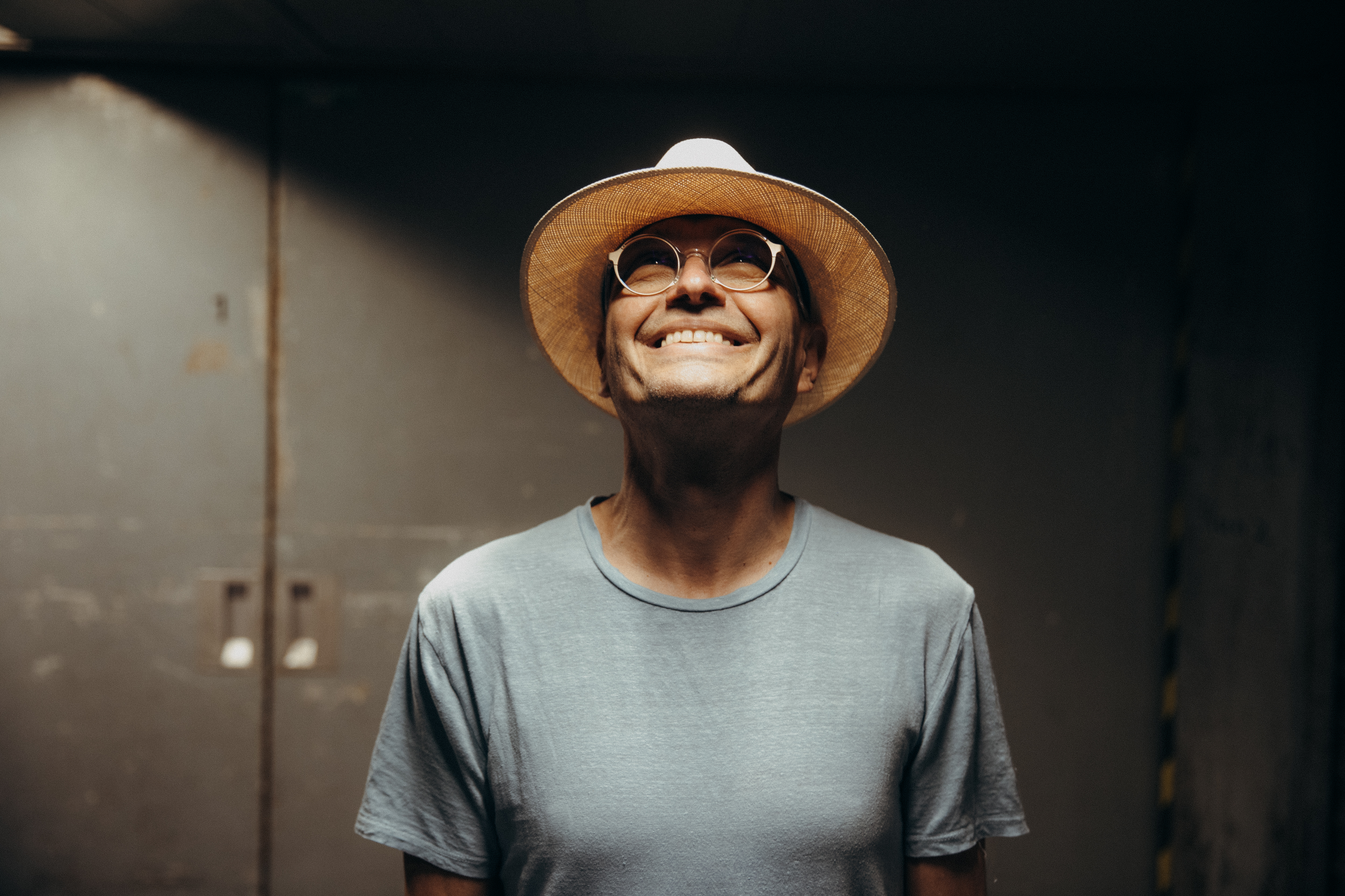 Loy Wesselburg